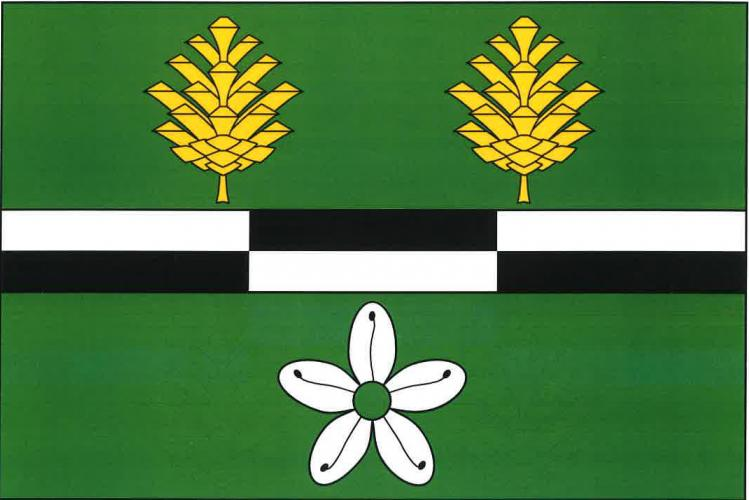 vlajka Hranice